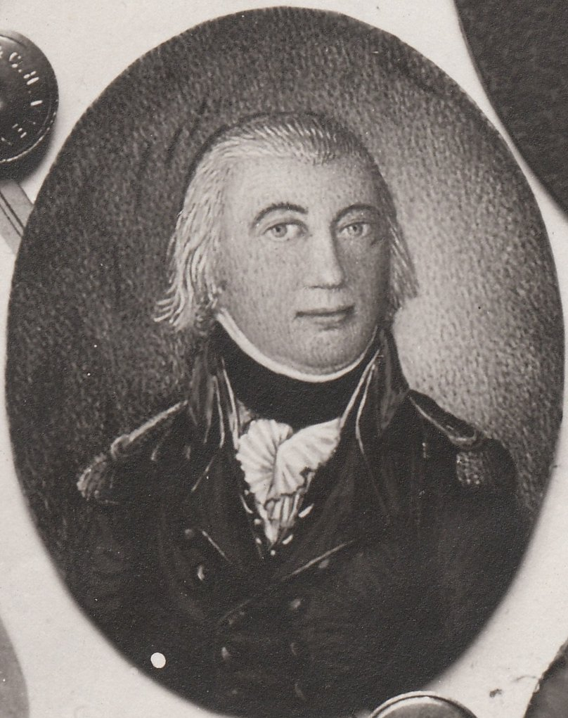 Format: Fotopositiv Dato / Date: 1897 Fotograf / Photographer: Erik Olsen (1835 - 1920) Sted / Place: Trondheim Google Street View: g.co/maps/zucy6 (Vår Frue gate 3) Wikipedia: Krigskommissær Eier / Owner Institution: Trondheim byarkiv, The Municipal Archives of Trondheim Arkivreferanse / Archive reference: Tor.H4x.Bxx.Fxxxx Merknad: Fra utstillingen i anledning Trondhjems 900-årsjubileum i 1897. Utstillingstekst i Trondhjems 900 Aars Jubilæum: Katalog for Den Historiske Udstilling i Trondhjem 1897: 544. Wibe, Ditlev, f. 8/1 1751, d. 9/9 1834, Krigskommissær i Trondhjem fra 1788 - 1827; fra 1808 tillige Søkrigskommissær. Titulær Generalkrigskommissær; Fader af No. 542 - 43 Birgithe Johanne Wibe 1789 - 1875. Miniatur. Kaptein J. von Krogh. I 1801 var krigskommissær Ditlef Wibe 51 år og bodde i Vår Frue gate 3 sammen med sin kone i første ekteskap Canutte Paulina Nordahl på 40 år. Sammen hadde de døtrene Bergithe Johanne og Ane Catrine (12 og 5 år) og sønnene Johan Christian og Peder (10 og 7 år). I samme husholdning bodde også Canuttes søster, frøken Henningen Arnesia Nordahl på 39 år og tjenestepiken Ingeborg Christine Halvorsdatter på 22 år. Kilde: Folketellingen 1801